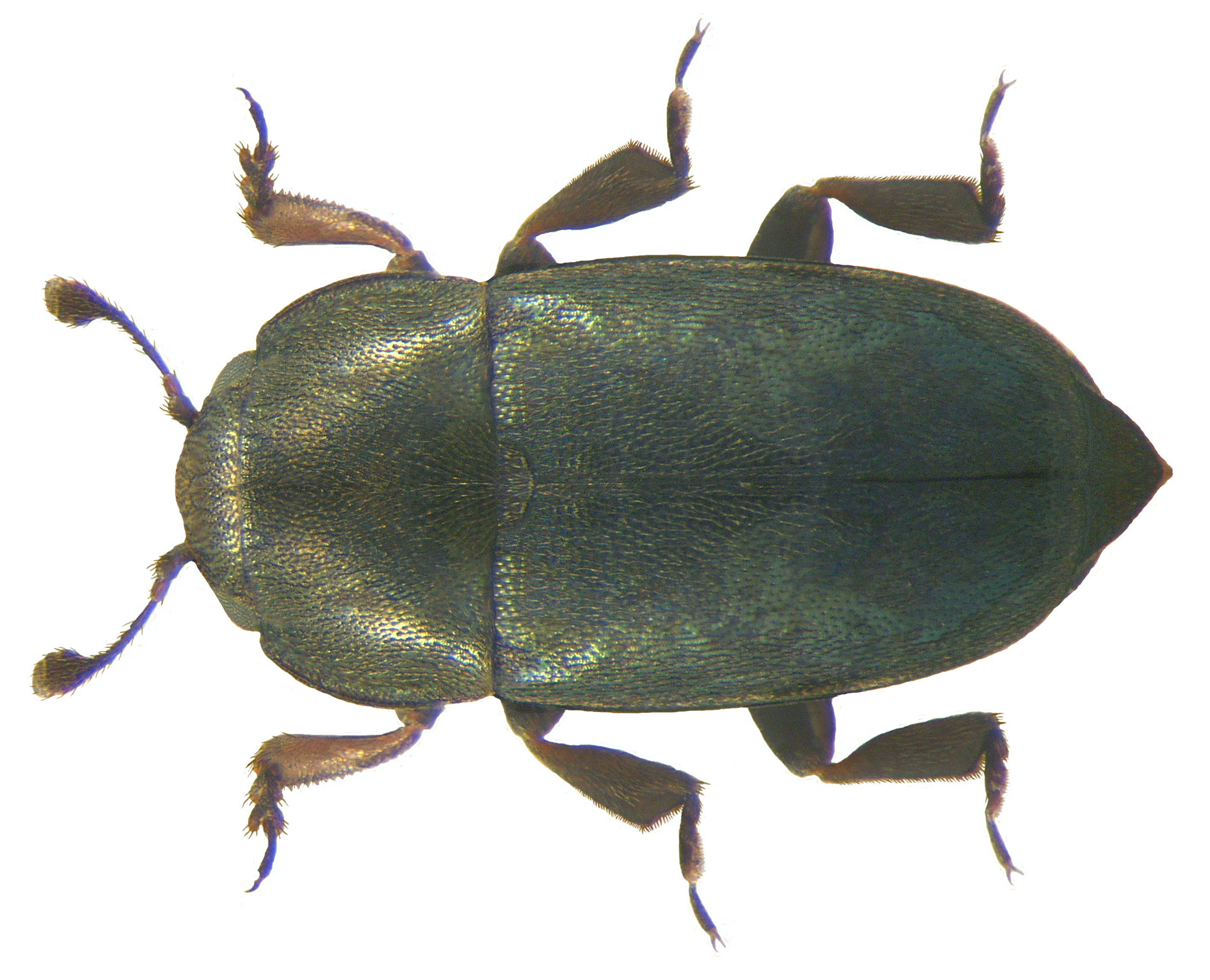 Familie: Nitidulidae Groesse: 1,5-2,7 mm Verbreitung: Europa Ökologie: Entwicklung an Kreuzblütler Fundort: Germania, Bayern, Oberfranken, Selbitz leg.det. U.Schmidt, 1972 Photo: U.Schmidt, 2009